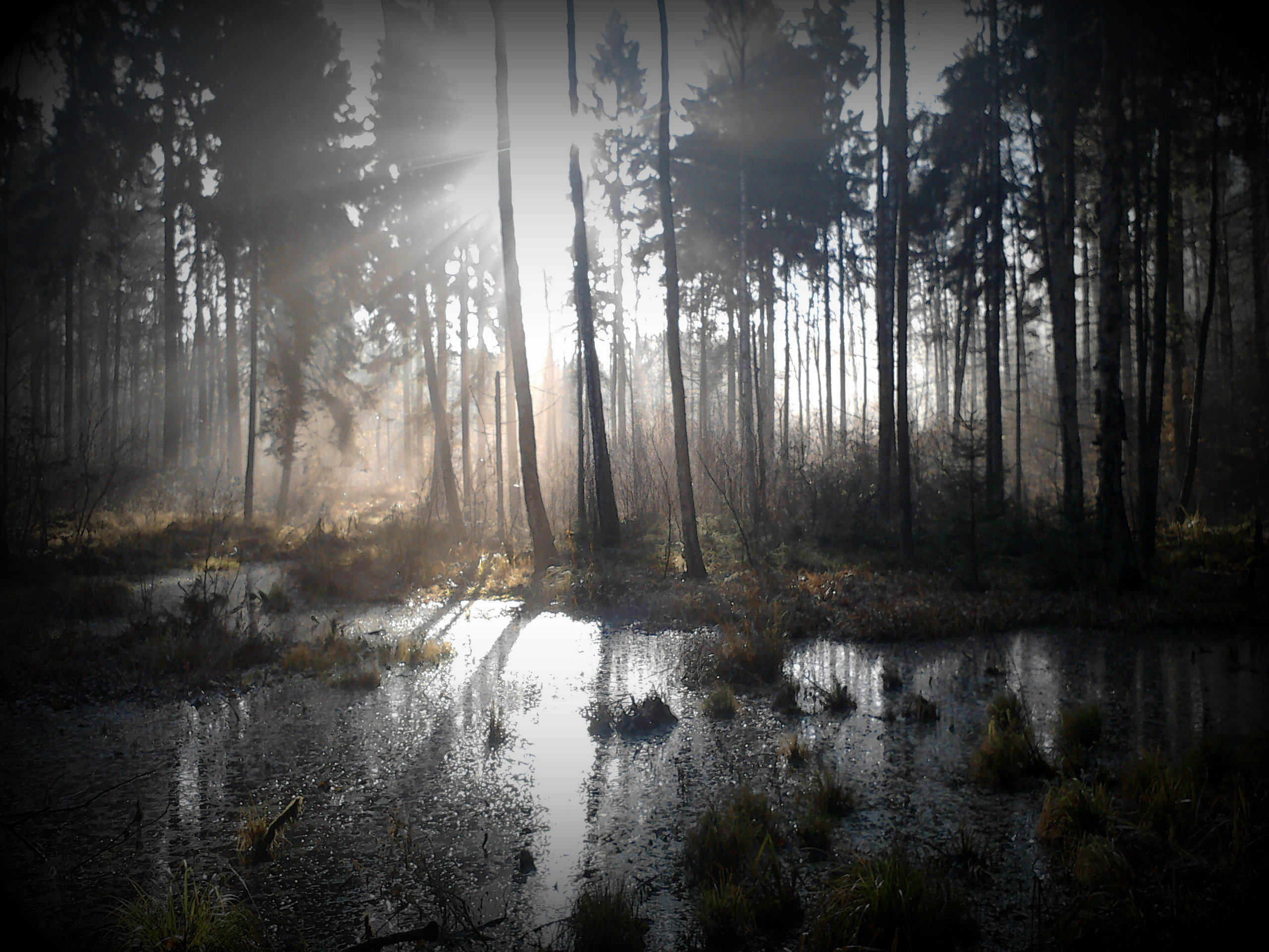 Autor: Adrian Grzegorz 25.11.2012